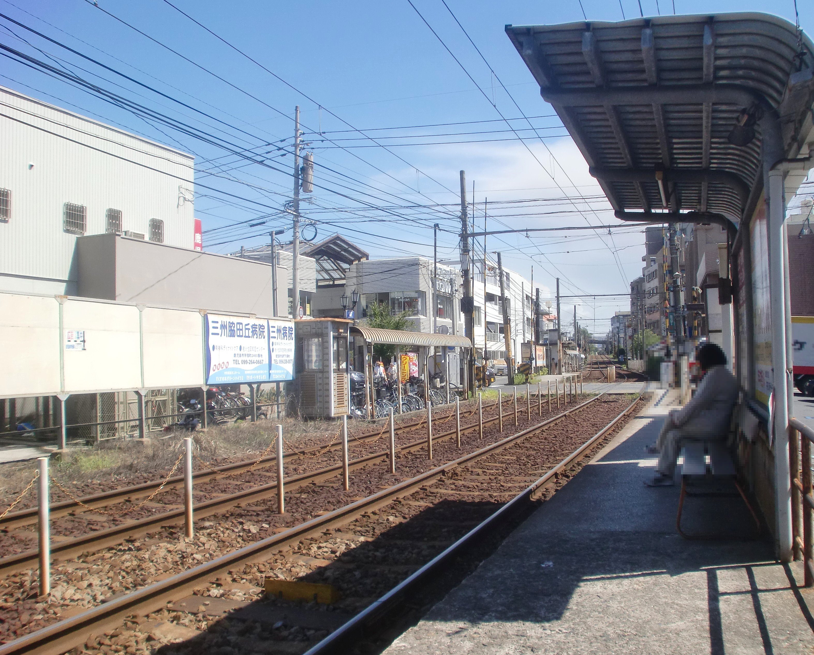 脇田駅外観。モザイク加工済み。